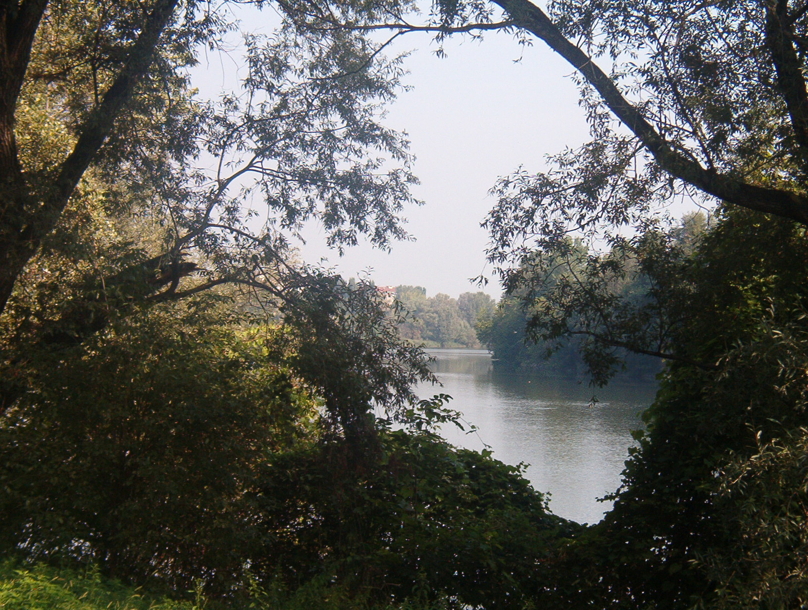 Fiume Po dal Parco Colletta - Torino - Italia